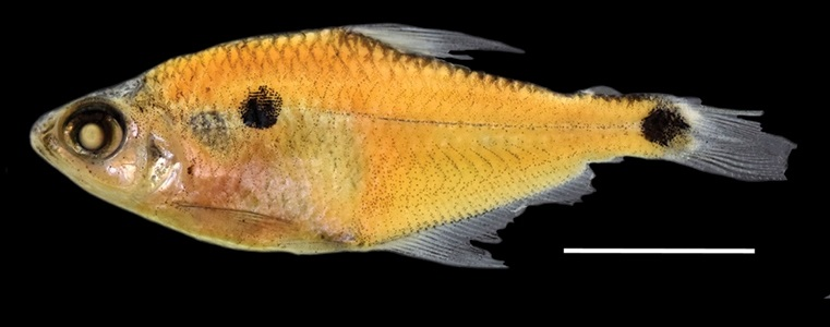 Phenacogaster wayana. Río Amapá, Brasil.